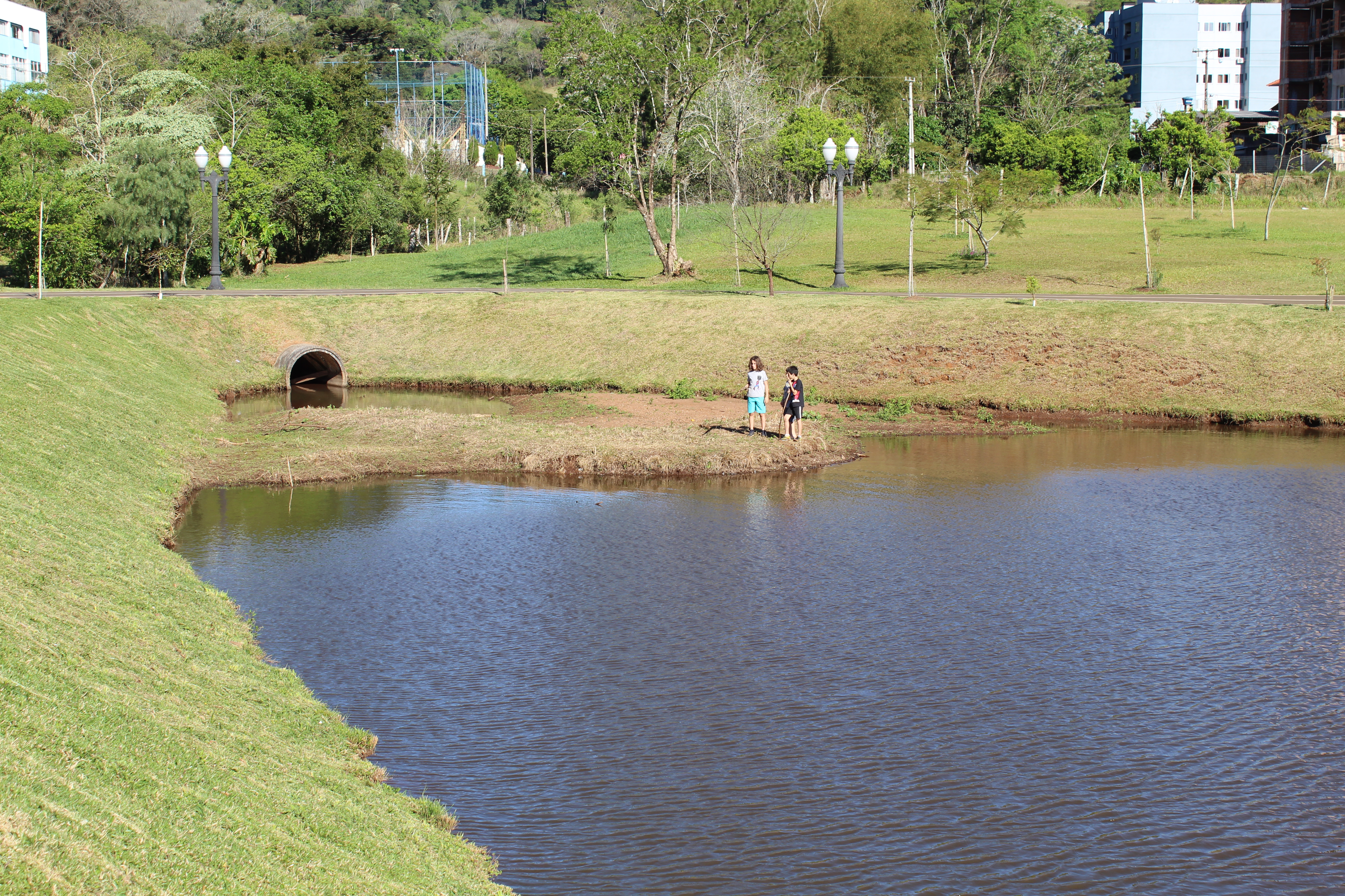 Crianças brincam sobre trecho assoreado de lago em Francisco Beltrão, PR